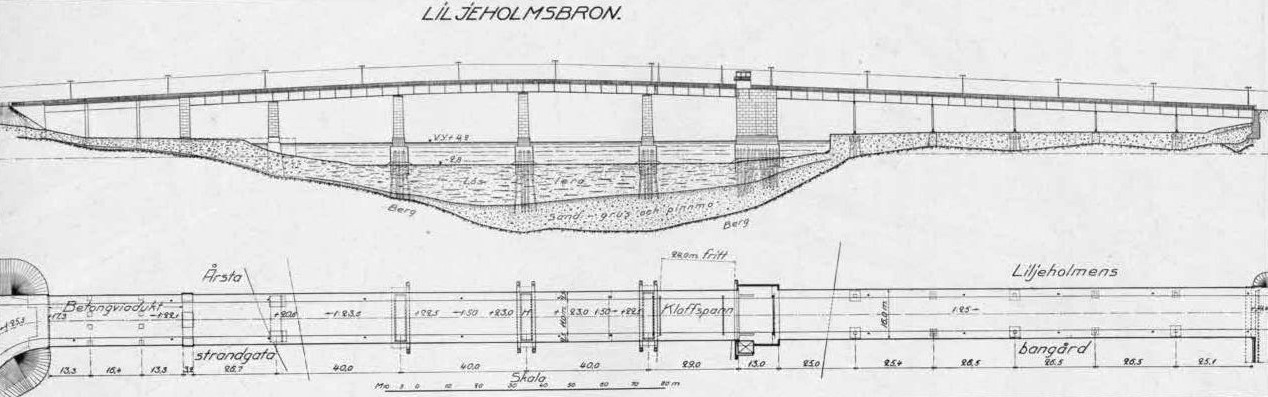 Liljeholmsbron sektion 1928 arkitekt Carl Bergsten